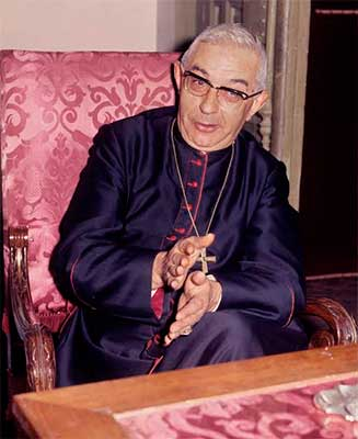 Vicente Enrique y Tarancón, cardenal-arzobispo de Madrid (1971-1983)